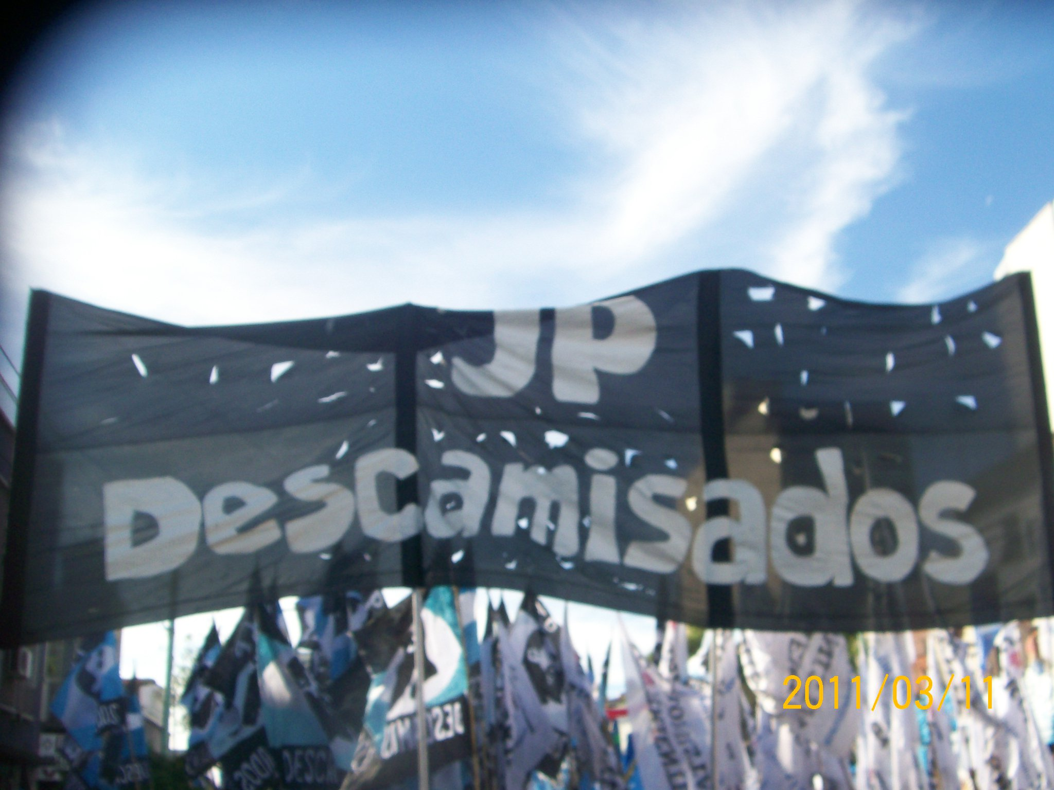 Jp Descamisados es el frente de Juventud de la Corriente Peronista Nacional.